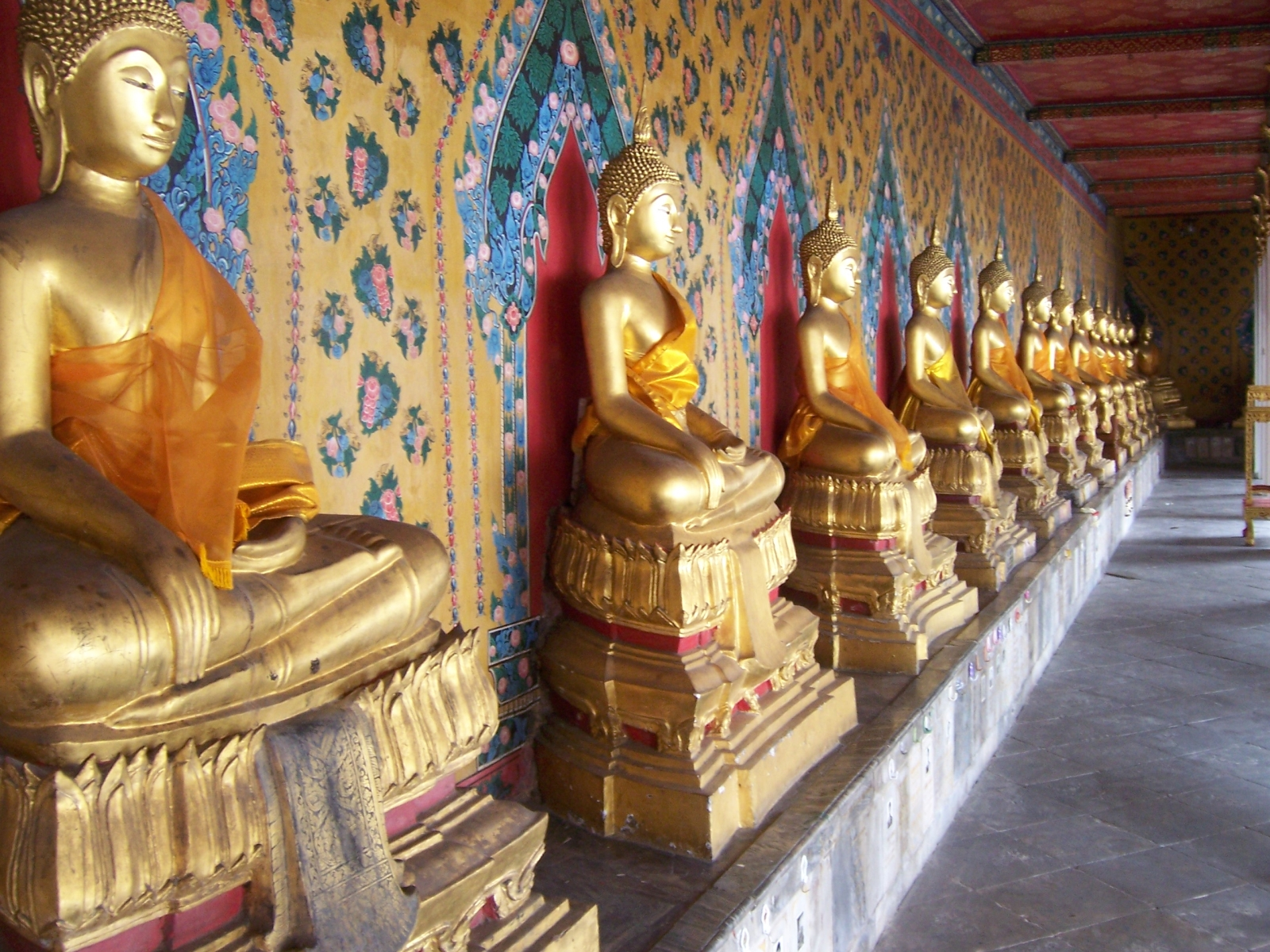 Wat Arun Area, Bangkok